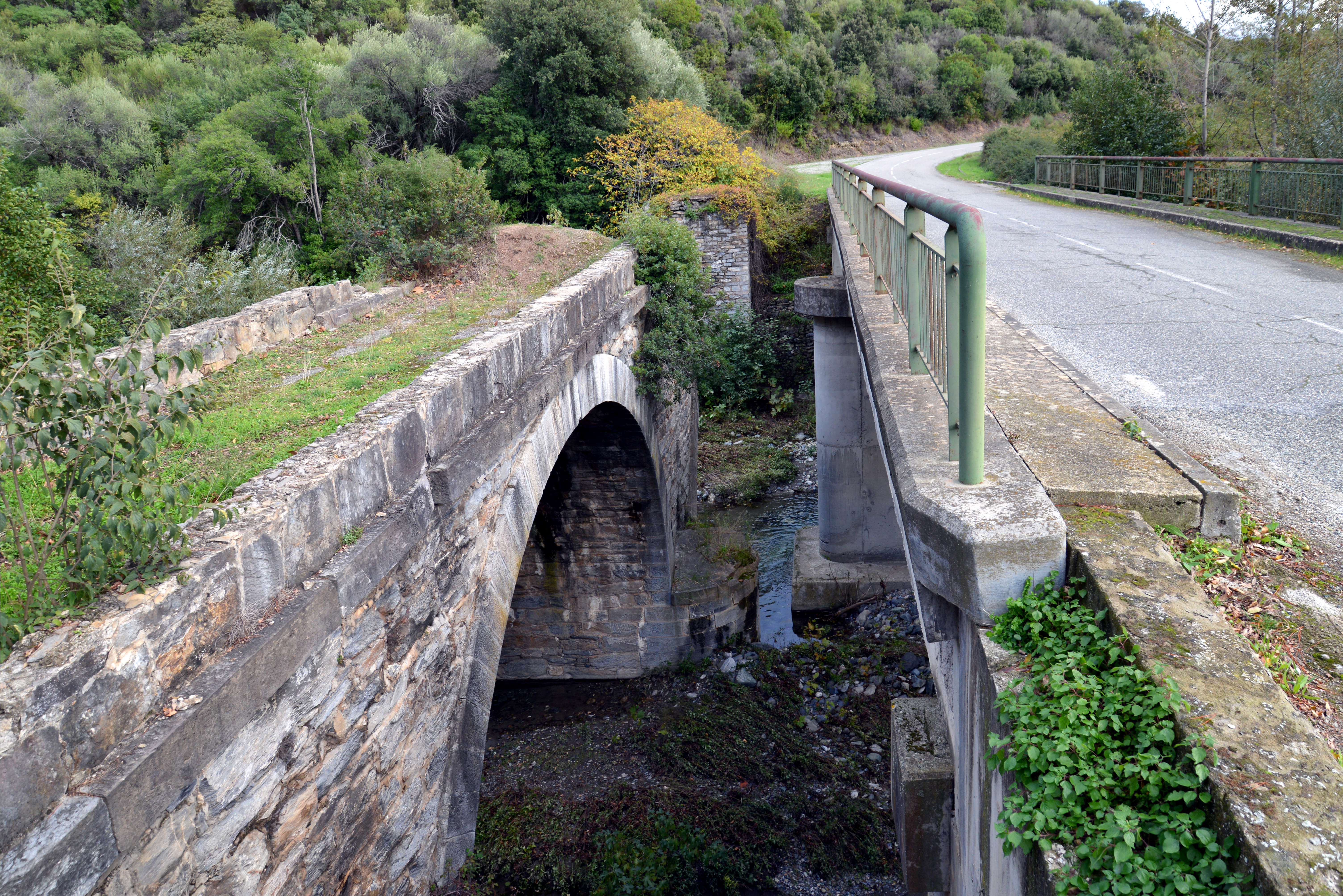 Tallone, Plaine Orientale (Corse) - L'ancien (démoli par les troupes allemandes en 1943) et le nouveau pont de la route D16 sur la Bravone, « à cheval » sur les communes de Tallone et de Tox